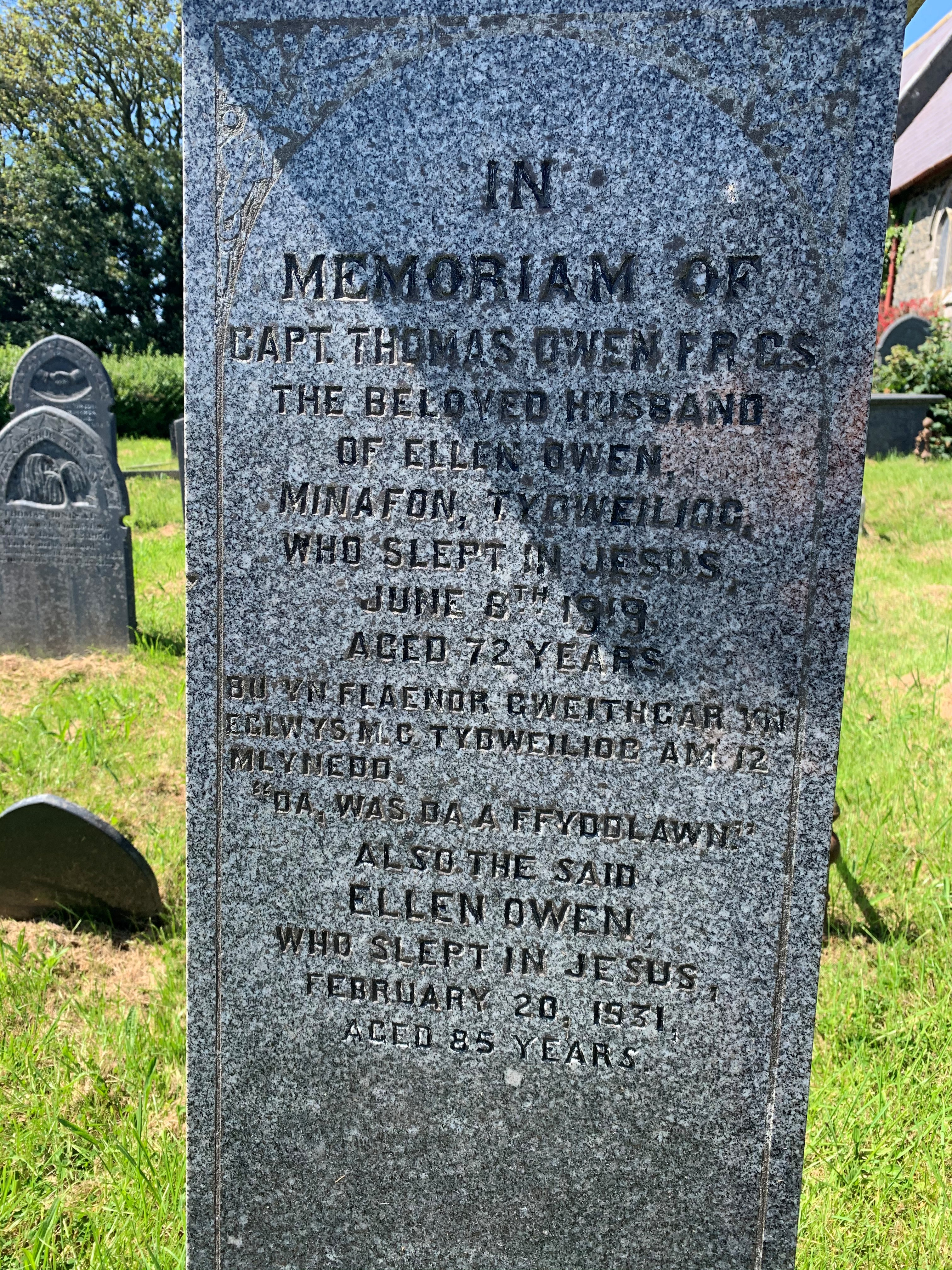 Carreg fedd Ellan a Thomas Owen.